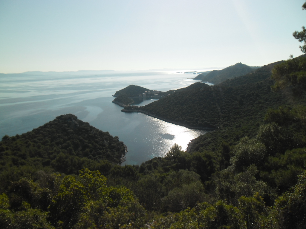 Zaklopatica gledana s ceste, otok Lastovo